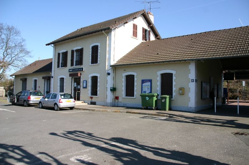 Gare de La fertais-Alais. Le batiment voyageurs.